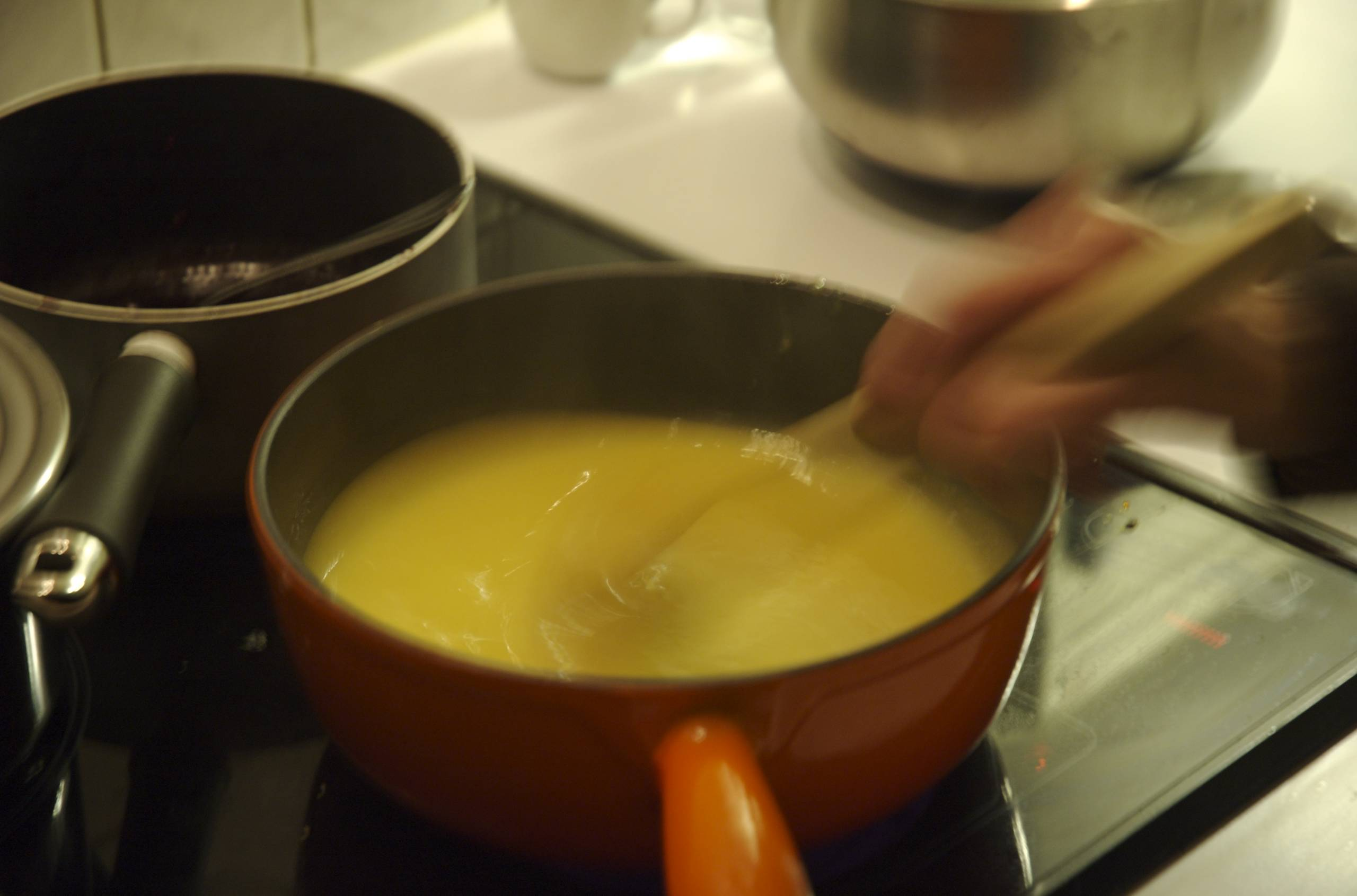 Remequin (fromage) fondu